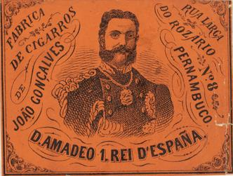 Rótulo de cigarro. D. Amadeu I, Rei da Espanha. A coleção Brito Alves é composta de 1.252 rótulos de cigarros na técnica litográfica. Foi iniciada pelo comerciante Vicente de Brito Alves e continuada pelo seu filho, o advogado pernambucano José de Brito Alves (1887-1963). Em 1964 a coleção foi doada pela família ao então Instituto Joaquim Nabuco de Pesquisas Sociais. Constitui-se em um raro e valioso patrimônio cultural e artístico, registrando fatos históricos, usos, costumes e aspectos da vida cultural da sociedade brasileira e particularmente da pernambucana, no final do século XIX até as primeiras décadas do século XX.